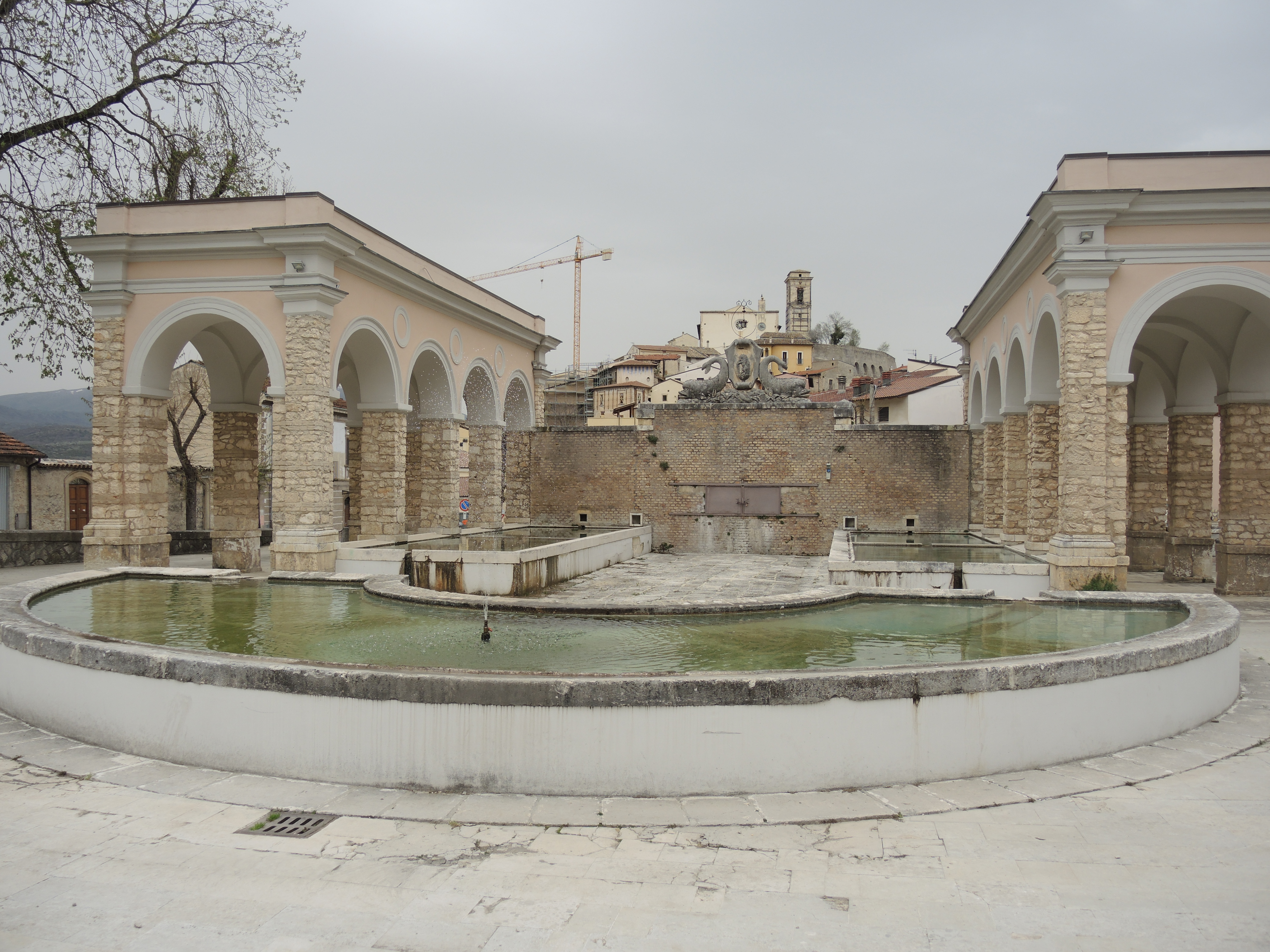 Goriano Sicoli: Fontana monumentale